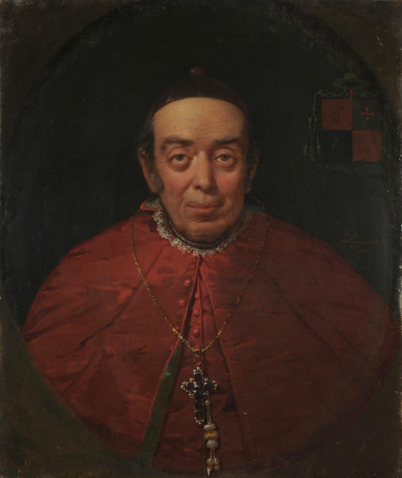 Retrato del politico y religioso Diego Elizondo Prado (1779-1852); llegó a ser obispo de Concepción y presidente del Senado de Chile